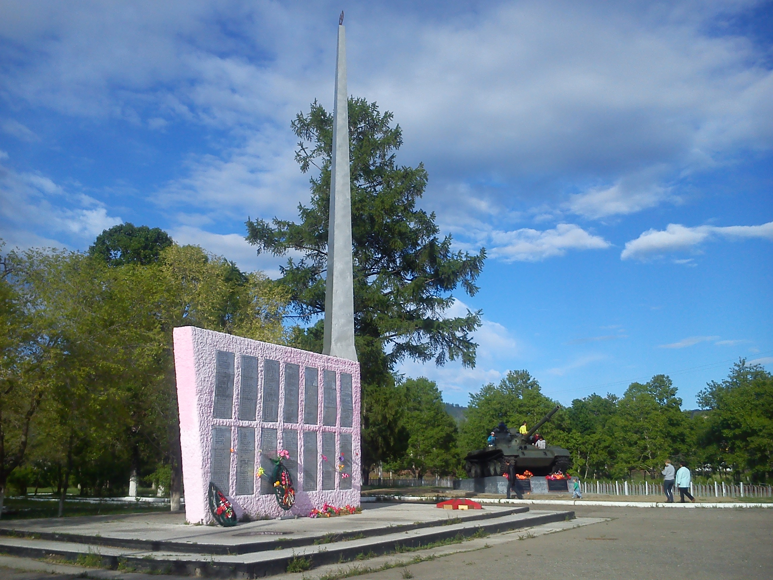 Мемориал Победы в городе Закаменск, на заднем плане - Генерал-танк